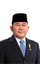 nachrowi